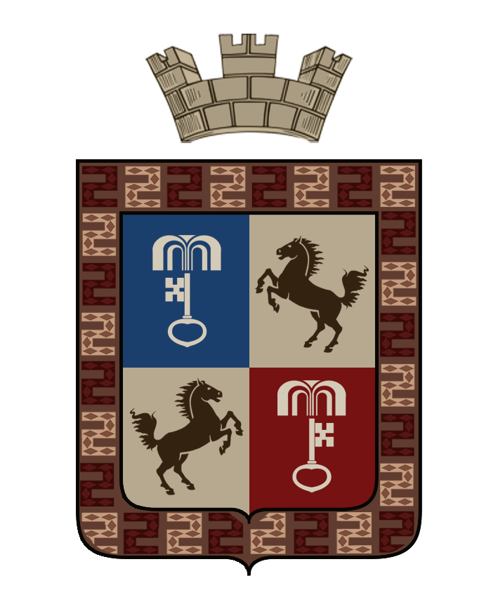 Официальный герб İeib ссылается на официальный сайт [1], [2]